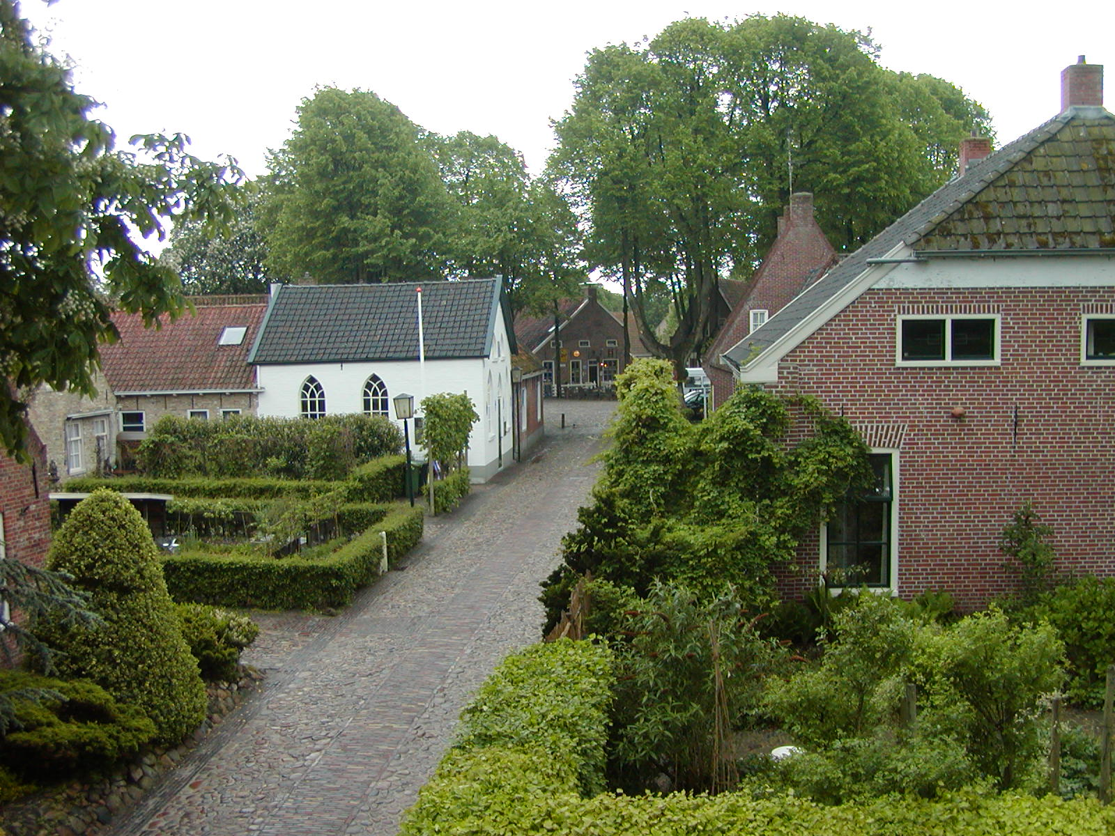 Bildbeschreibung: Blick auf Synagoge und Markt Fotograf-- Ingo2802 23:02, 19. Mai 2006 (CEST) Datum: 19.05.2006 Sonstiges: ...